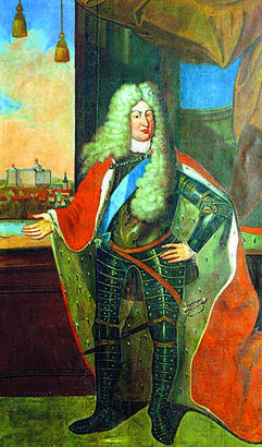 Johann Adolf I., Herzog von Sachsen-Weißenfels (1649-1697)